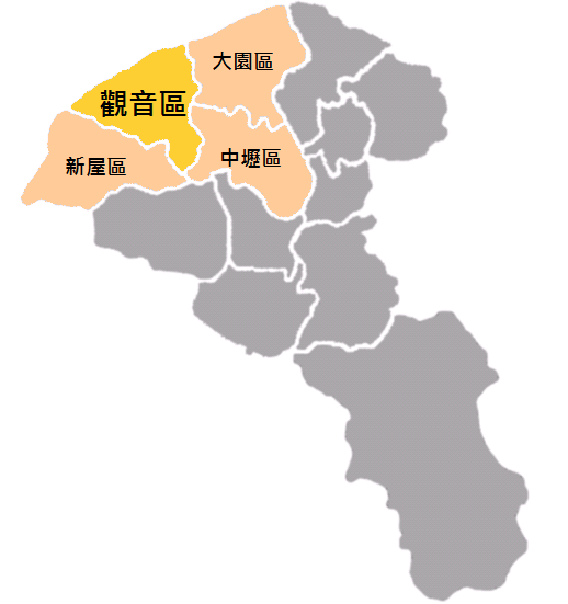 觀音區位置圖